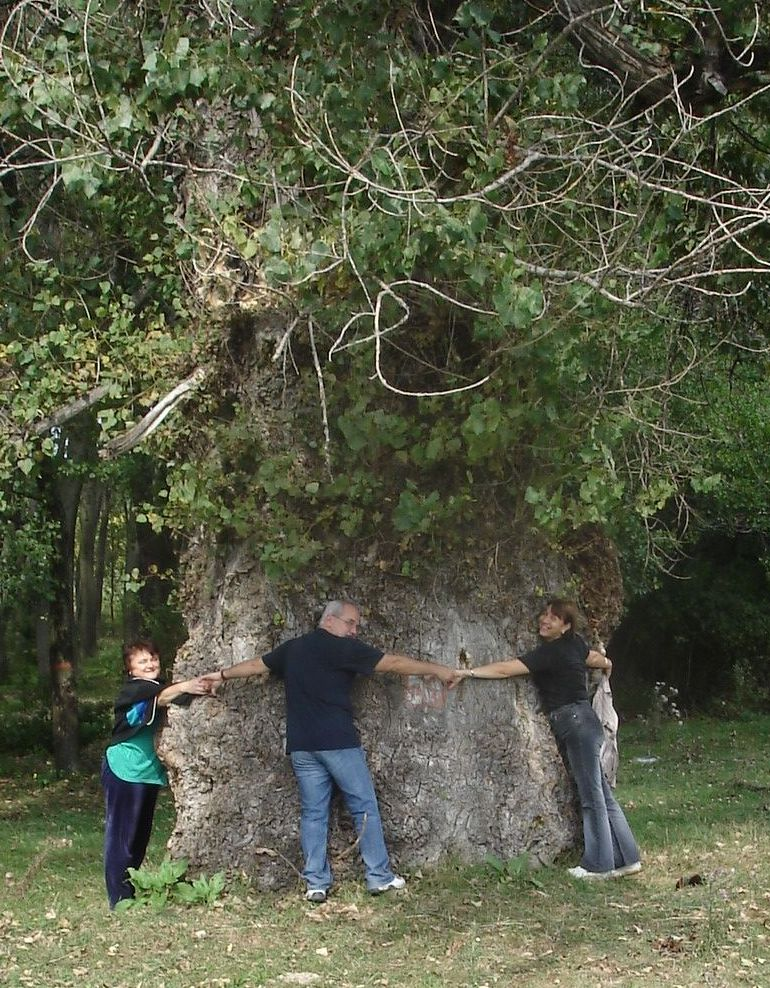 Plop bătrân lângă izlazul din Băneşti, jud Dâmboviţa. 03.06.2006 - Fotografie de Miehs Cristian-Mihail